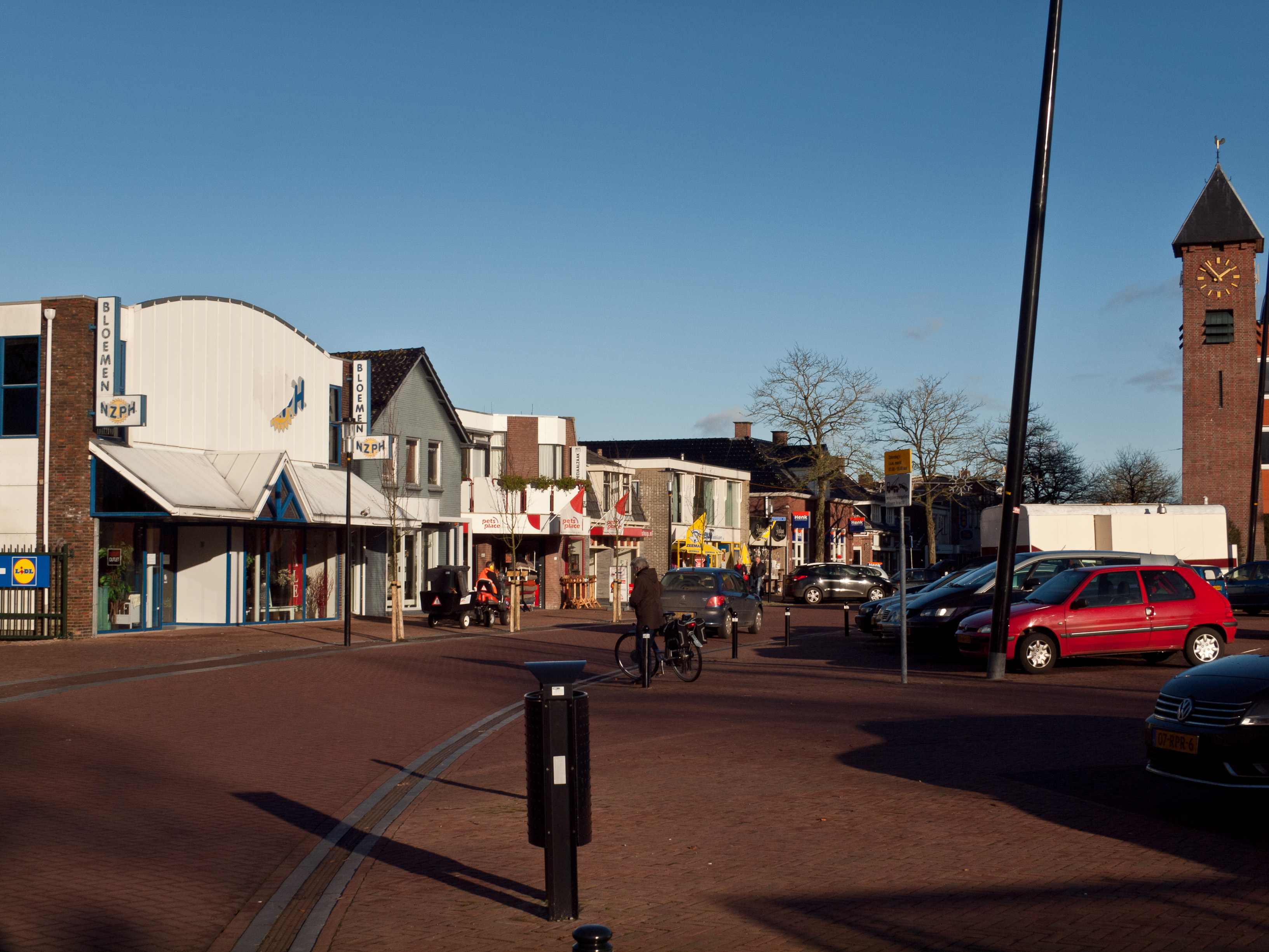 Het centrum van Surhuisterveen in herfst van 2012